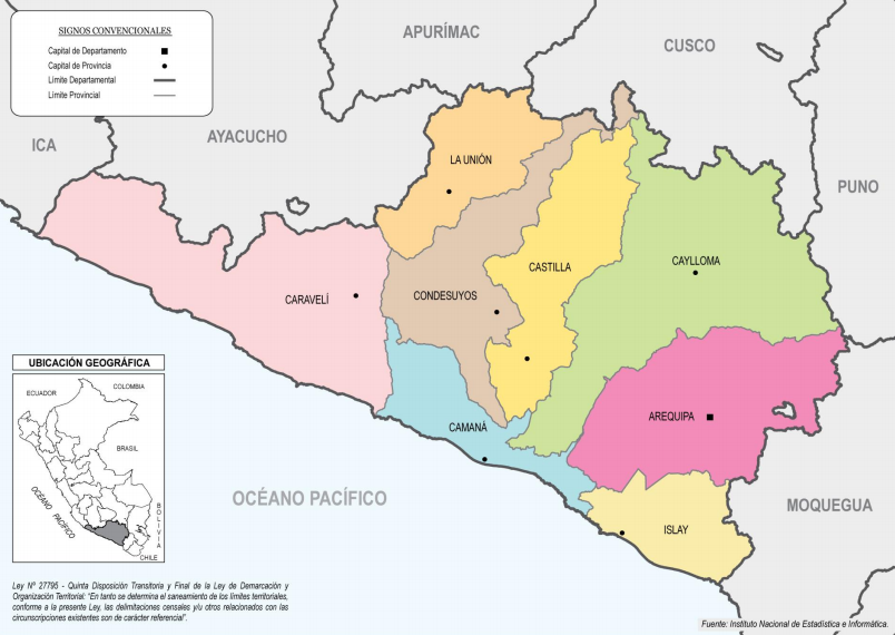 Mapa político del Departamento de Arequipa, contiene sus provincias y la ubicación de sus respectivas capitales